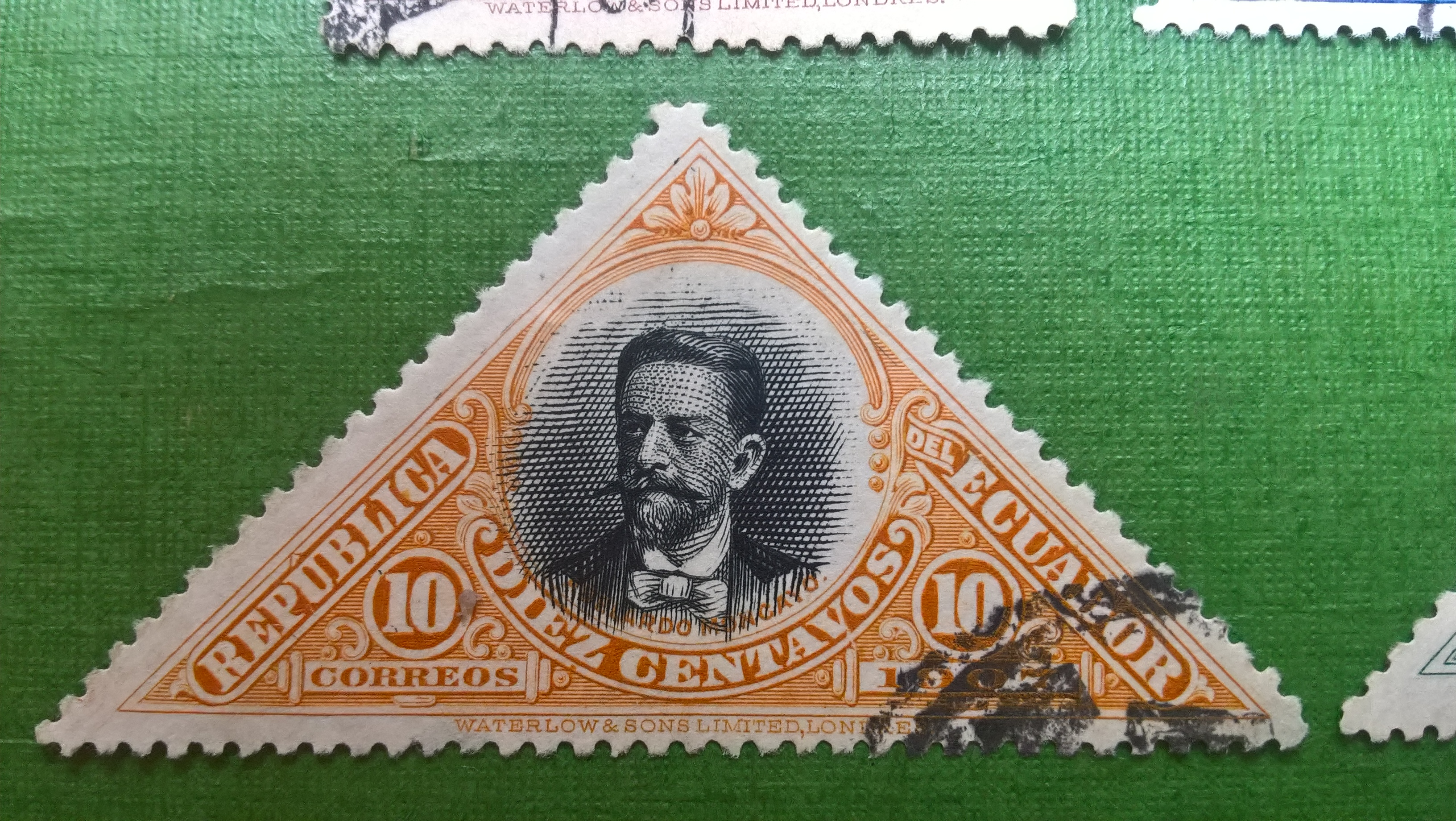 Estampilla ecuatoriana de 10 centavos en honor a Abelardo Moncayo en la serie de estampillas del ferrocarril de Quito a Guayaquil. 1907.